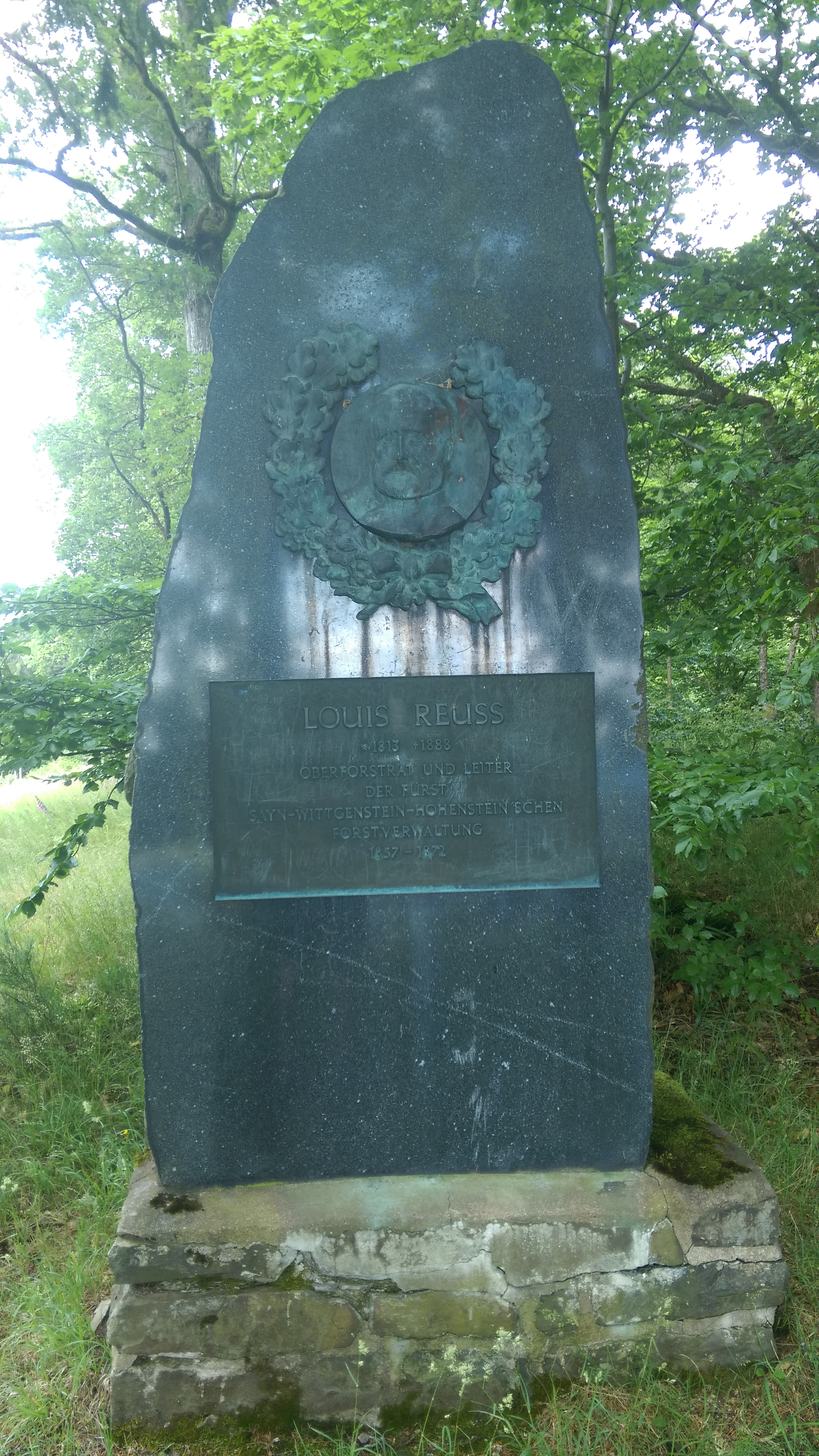 Louis Reuß (1812-1888), Leiter der Fürst Sayn-Wittgenstein-Hohenstein´schen Rentkammer (1857-1872)